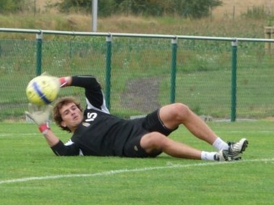 Seb Chabbert à Charleroi